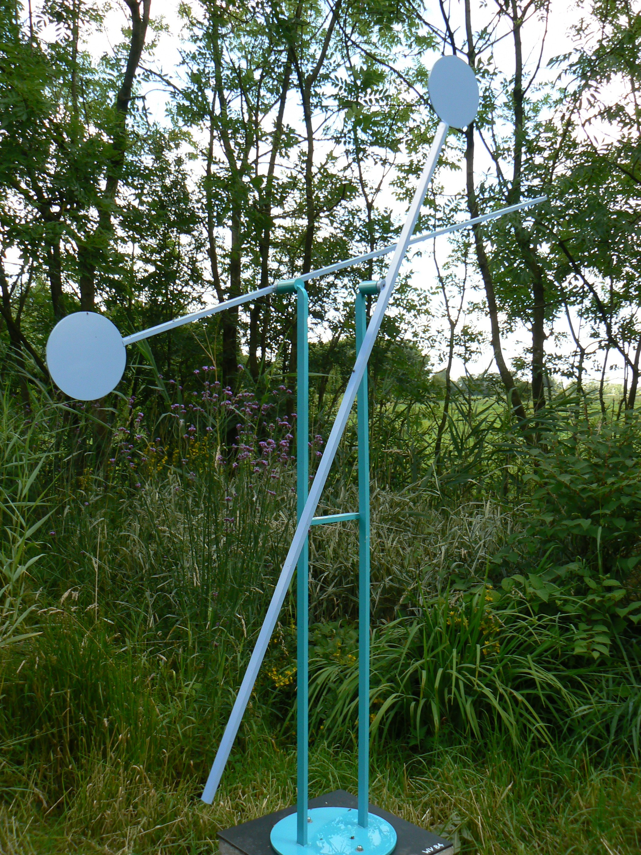 kinetic sculpture Funnix Germany